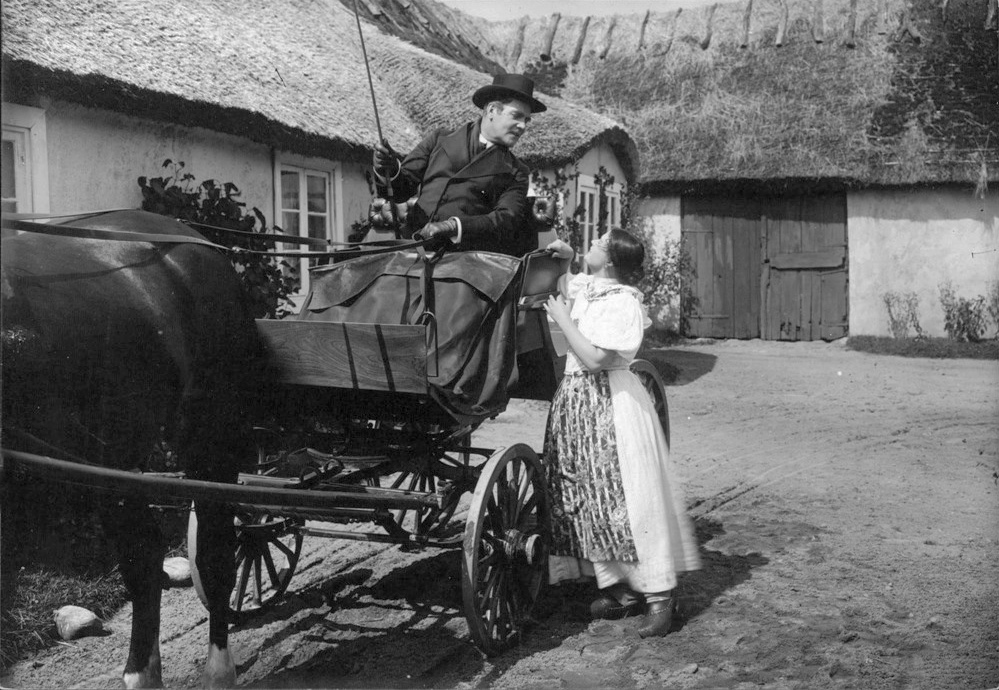 Film "Kvarnen" med A de Wahl och Clara Kjellblad.Mjölnaren far för att [oläsligt] giftermålet med Lise.